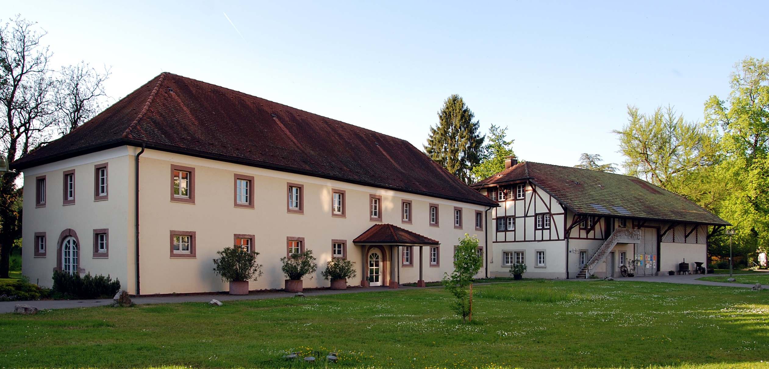 Schloss Beuggen: Gästehaus (links) und Scheune (rechts)